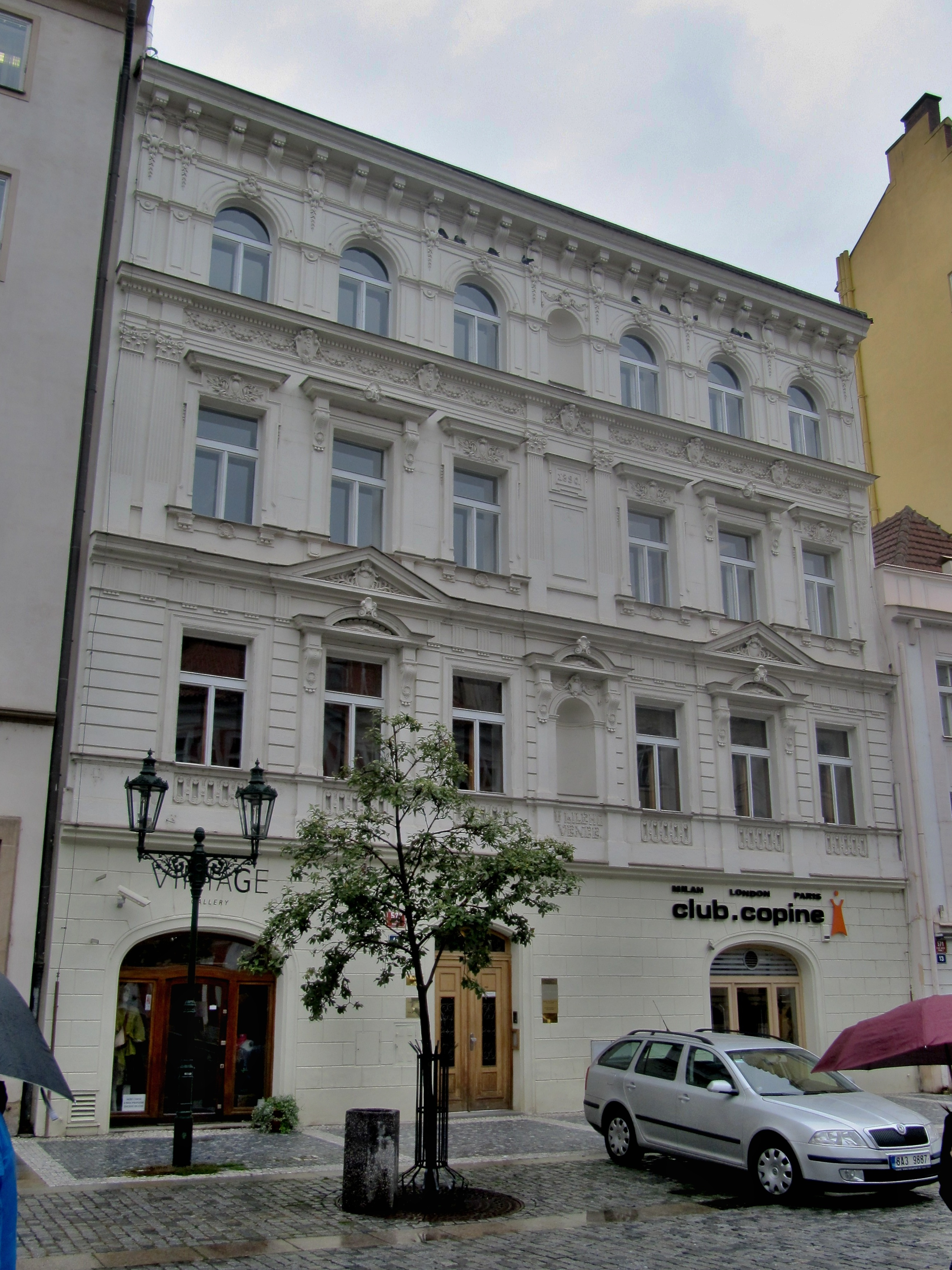 Městský dům U Bílého věnce (Staré Město), Praha 1, Ovocný trh 572/11, Staré Město